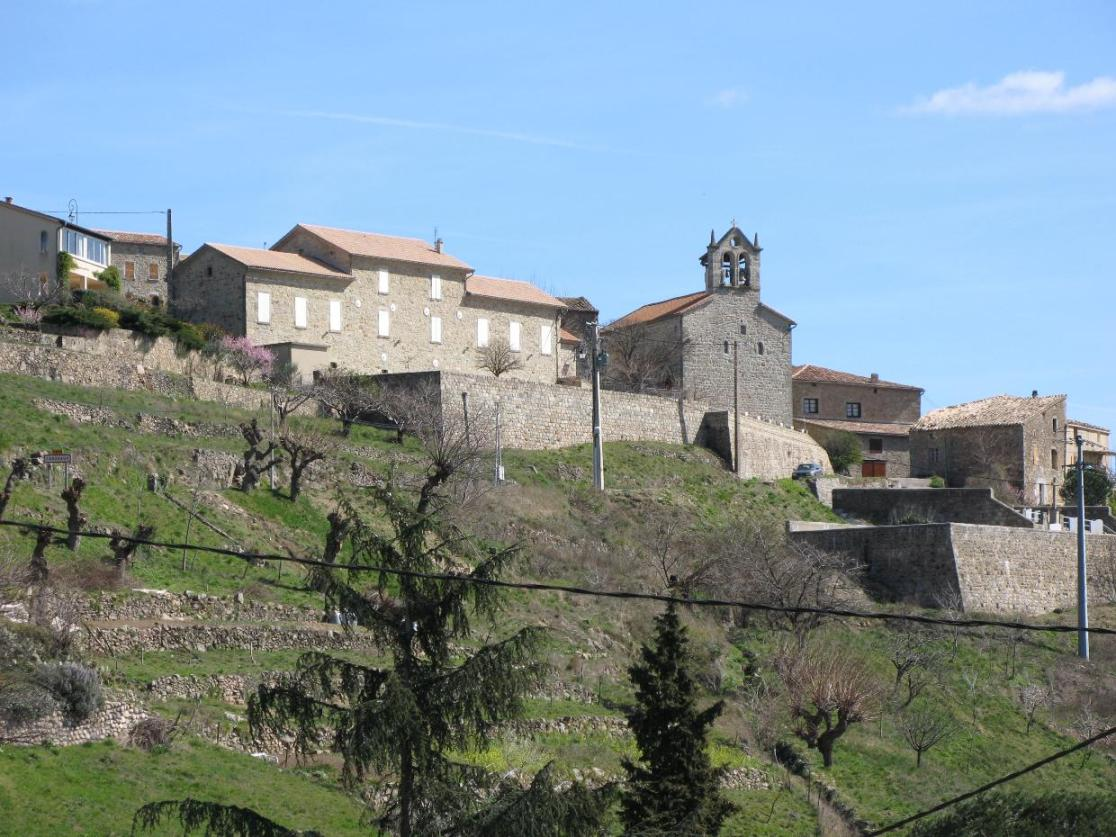 village de Chazeaux (Ardèche)